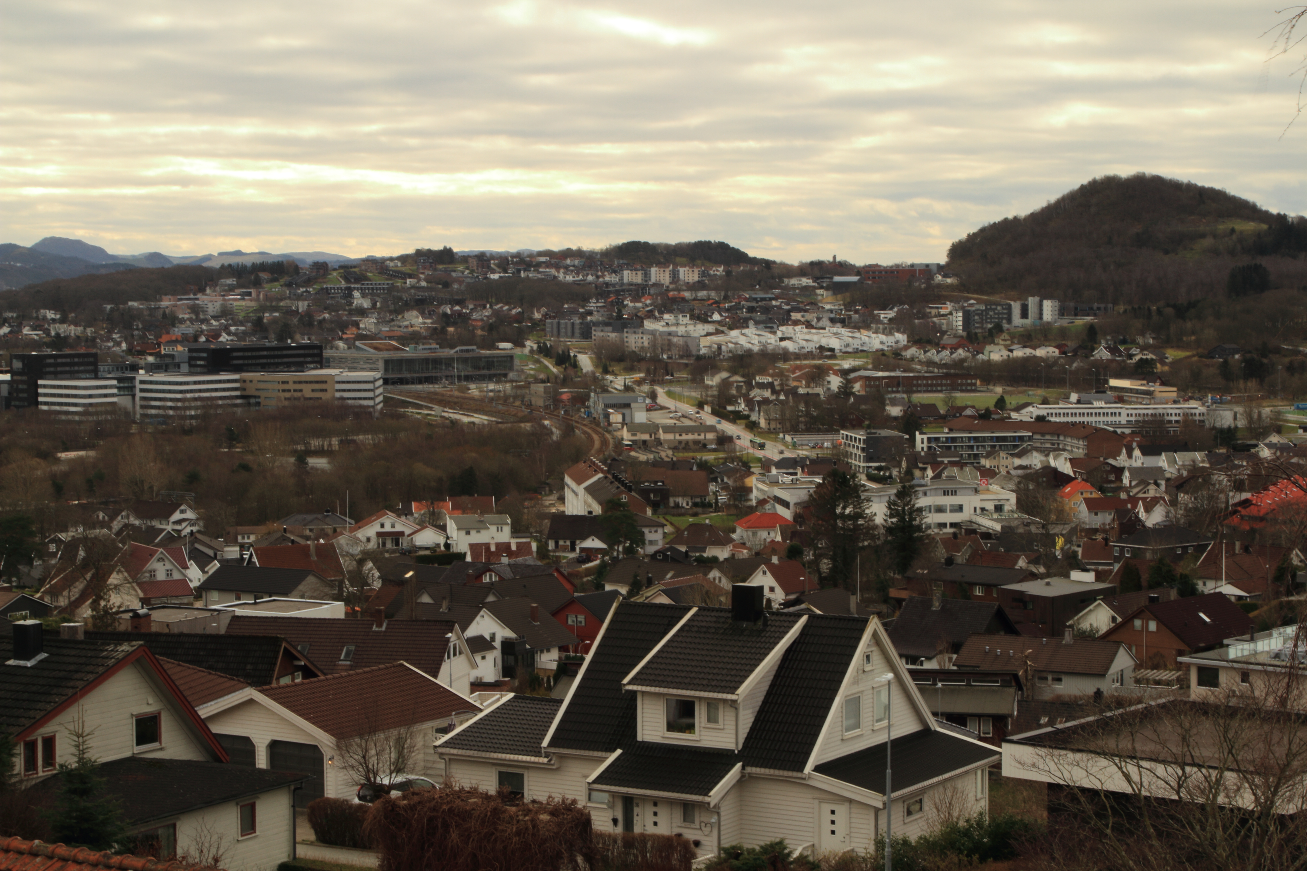 Hinna bydel i Stavanger, mot sør, med Jåttånuten